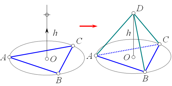 Преобразование 2-тетраэдра в 3-тетраэдр